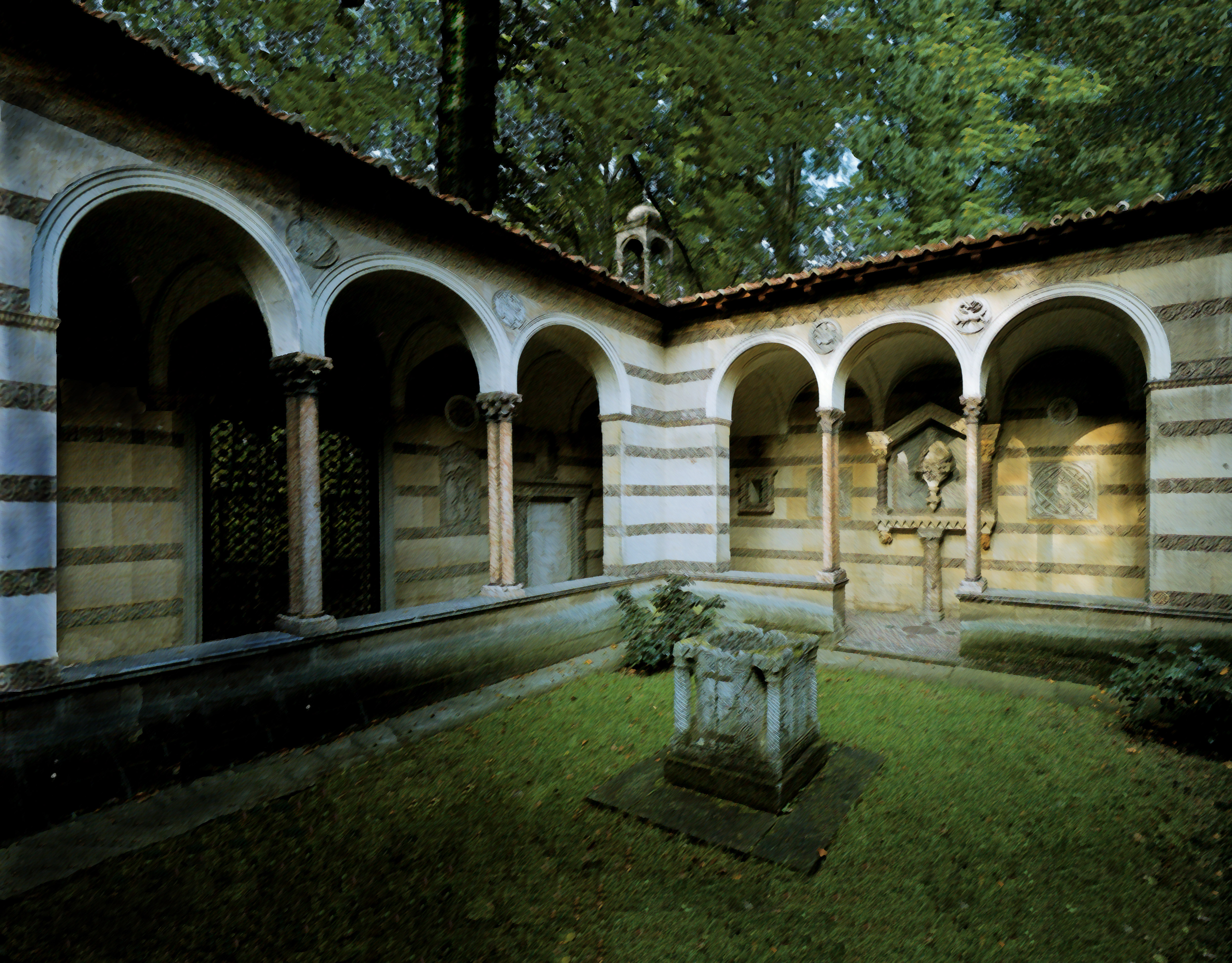 Das Innere des Klosterhofes in Klein-Glienicke